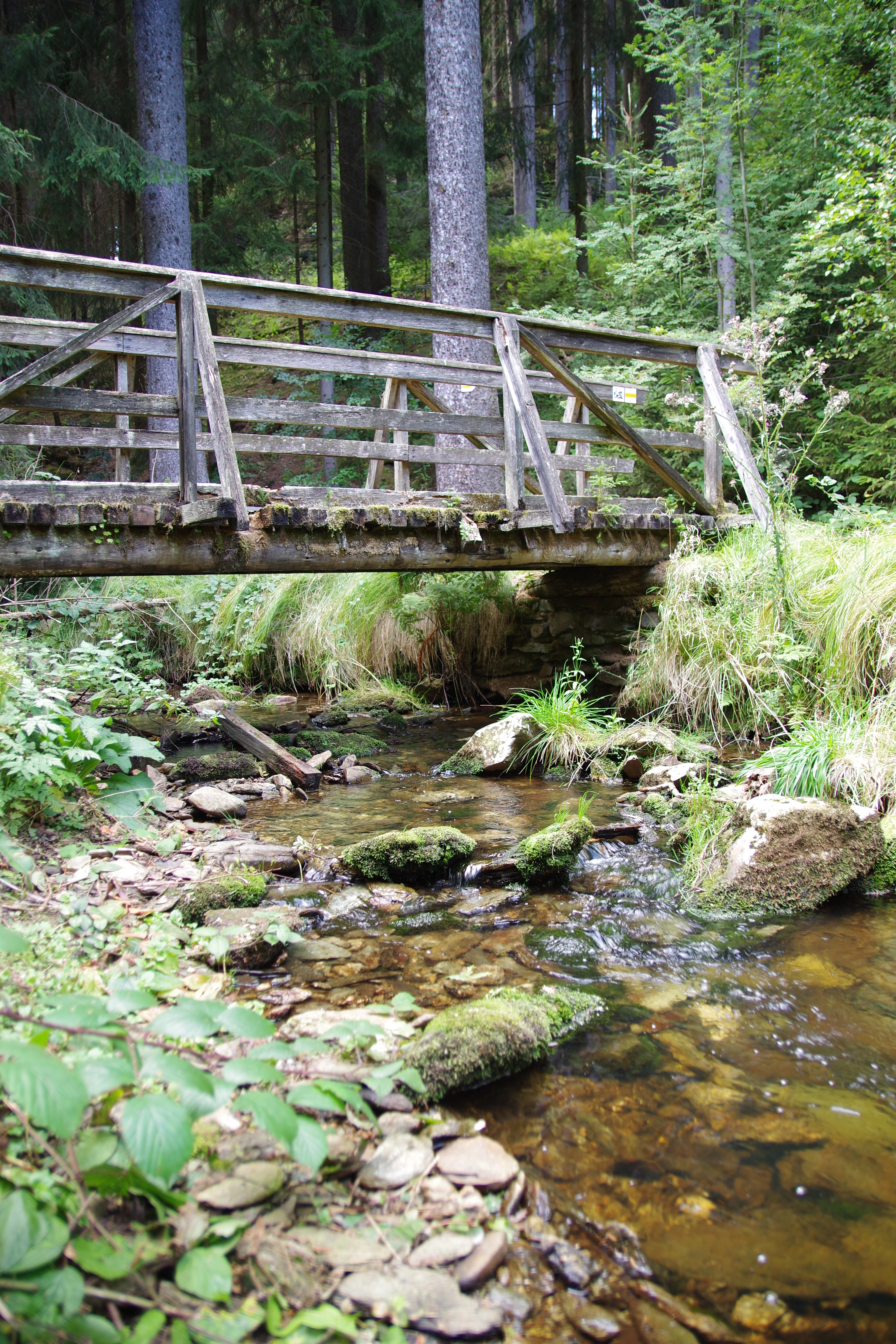 Weiße Göltzsch, oberhalb der Talsperre Falkenstein in der Ortslage Grünbach